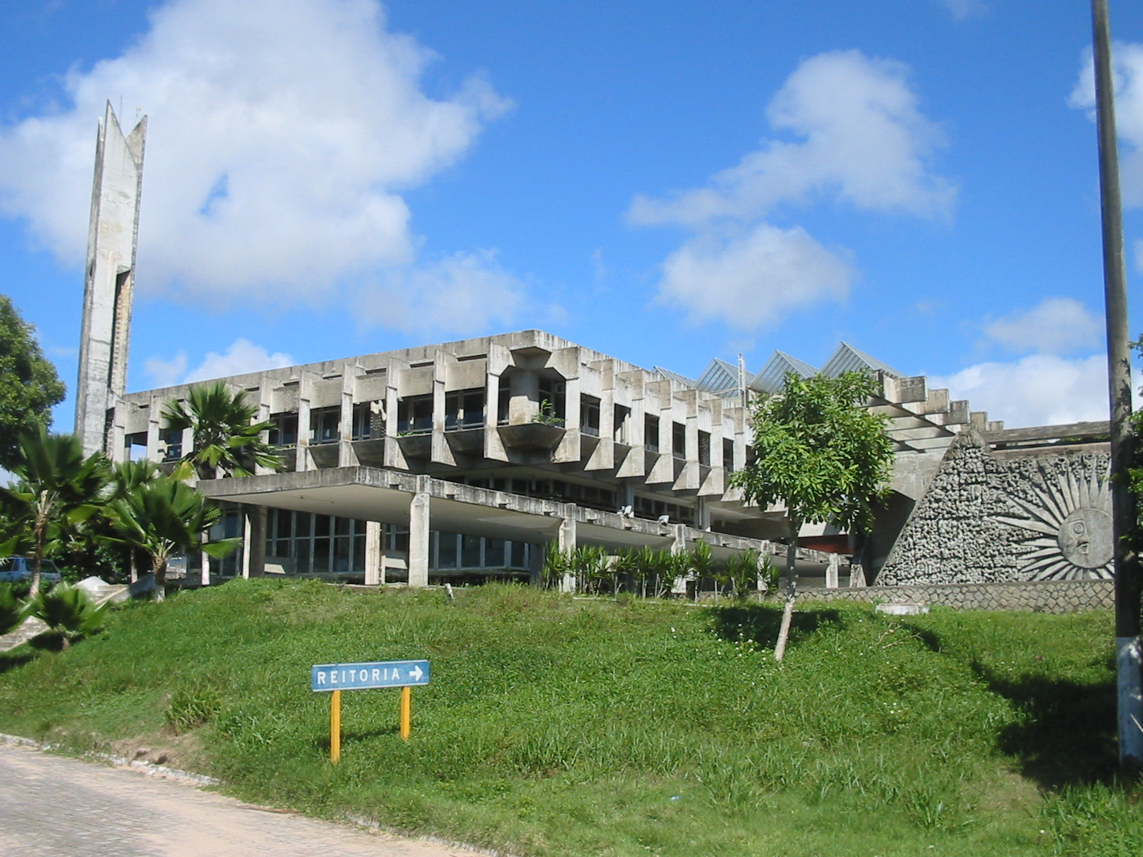 Natal (Rio Grande do Norte), Brasil. Reitoria da Universidade Federal (UFRN). Natal, Brazil. UFRN.